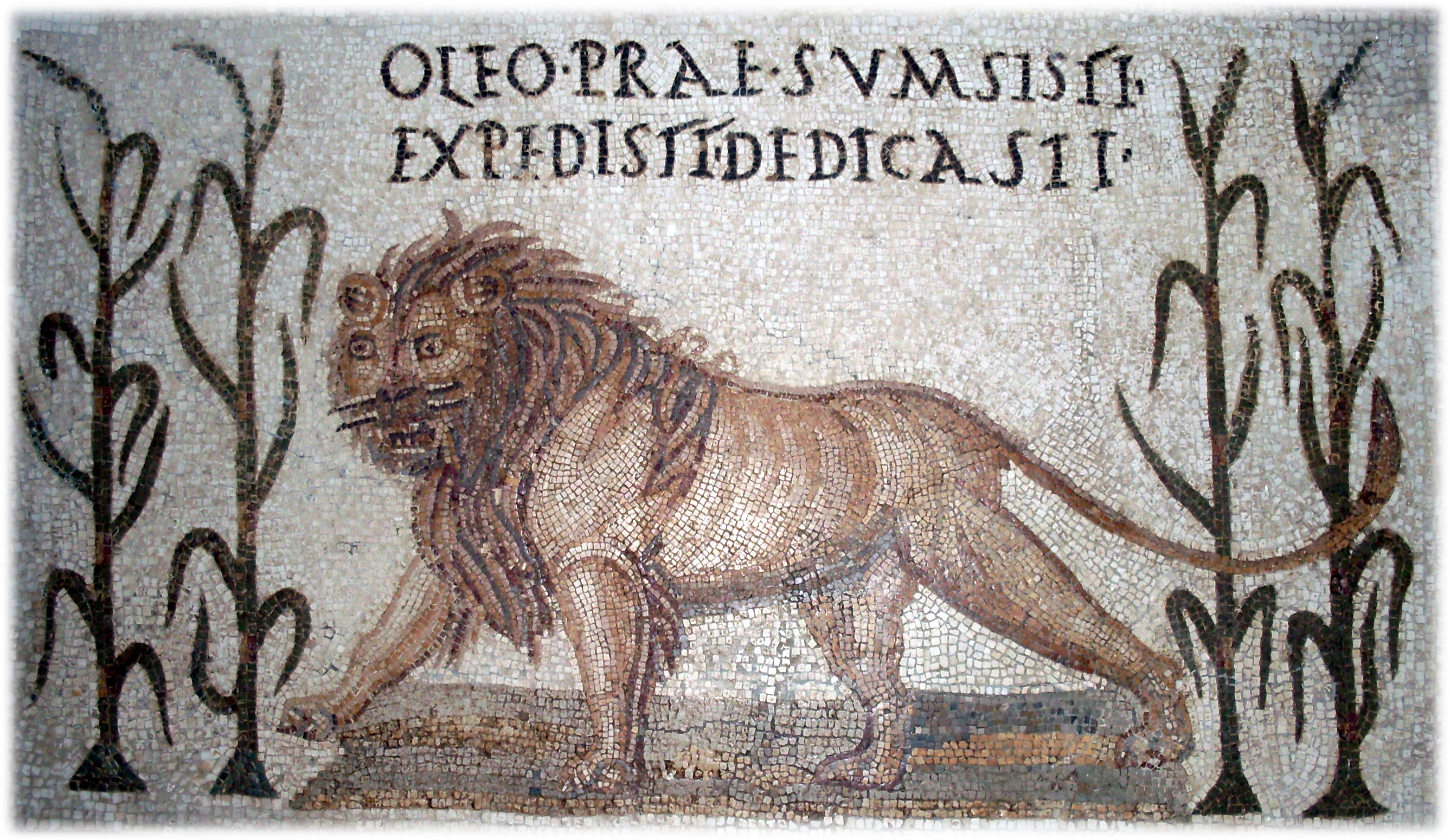 Lion encadré par quatre tiges de millets constituant l'emblème des Leontii